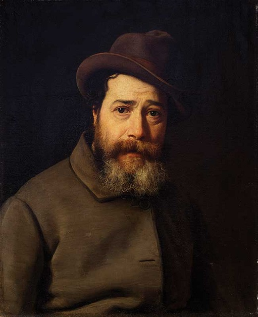 Autoritratto, olio su tela, Museo dell'Ottocento, Ferrara